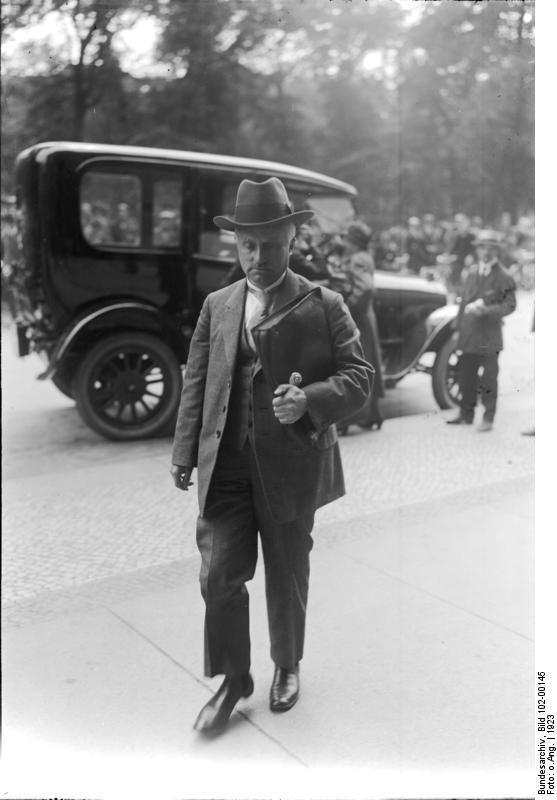 Zum Regierungswechsel in Deutschland. Der preussische Innenminister Severing, welcher viel durch die Auflösung der Selbstschutz-Organisation von sich reden machte.